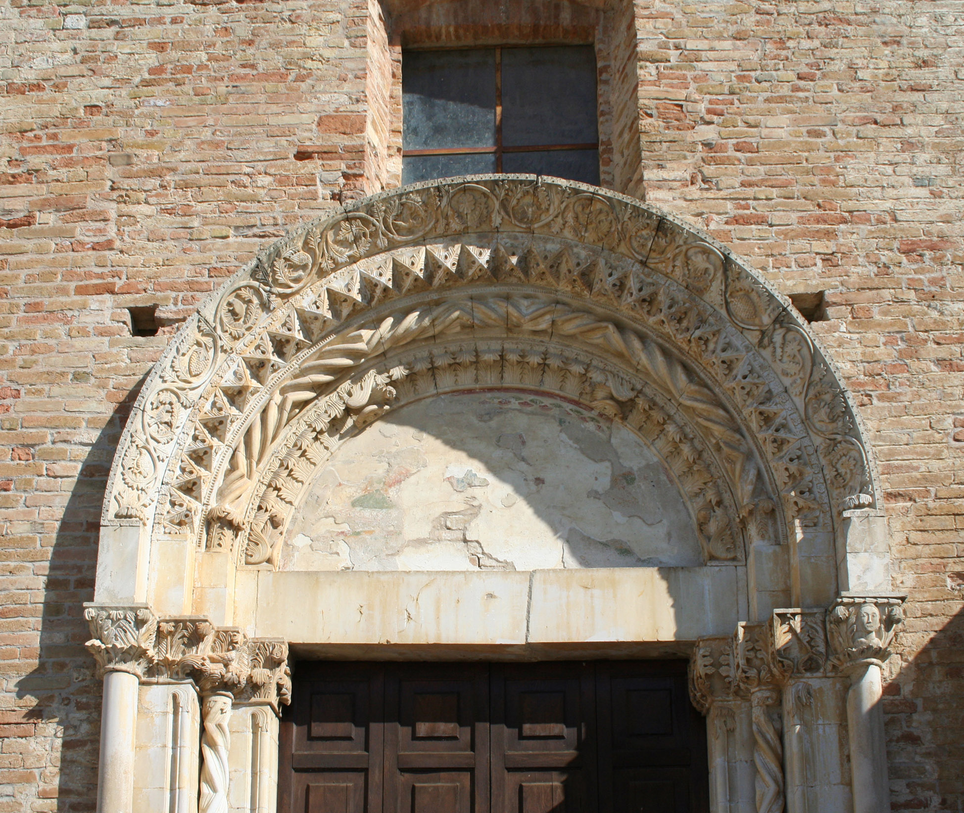 Chiesa di Santa Maria di Propezzano, lunetta del portale sulla porzione destra della facciata principale detto: "Porta Santa", estreno giorno dell'edificio religioso appartenente al complesso abbaziale omonimo nelle vicinanze del paese di Morrod’Oro in provincia di Teramo, Abruzzo, Italia.